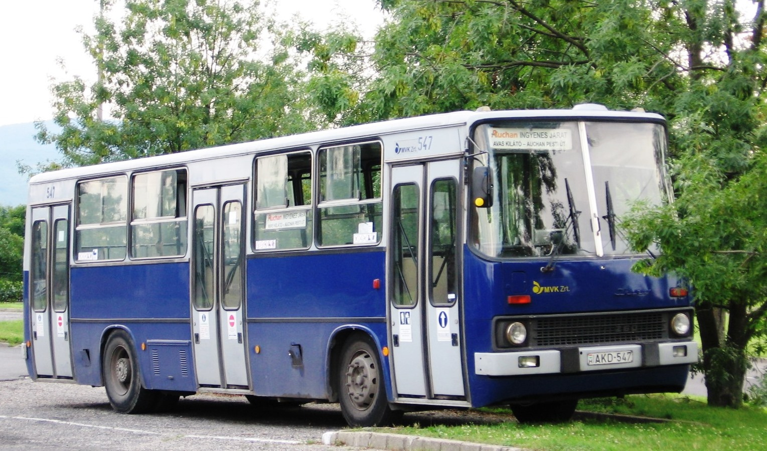 Egy Ikarus 260-as busz Miskolcon